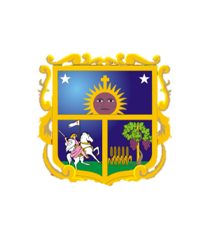 Escudo del Municipio de Querétaro